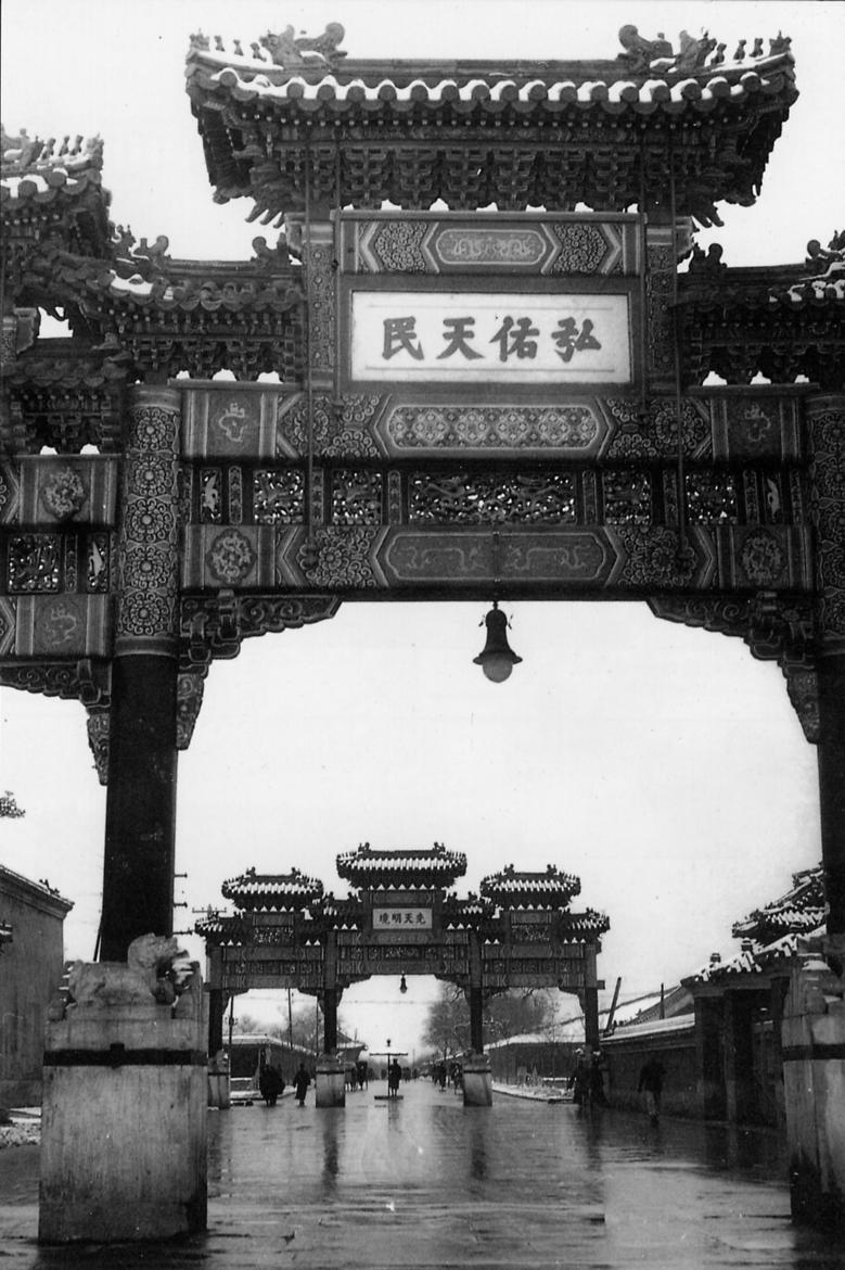 大高玄殿西侧牌楼，正面匾额“弘佑天民”，远处为东侧牌楼，背面匾额“先天明镜”。牌楼均于1950年被拆除。